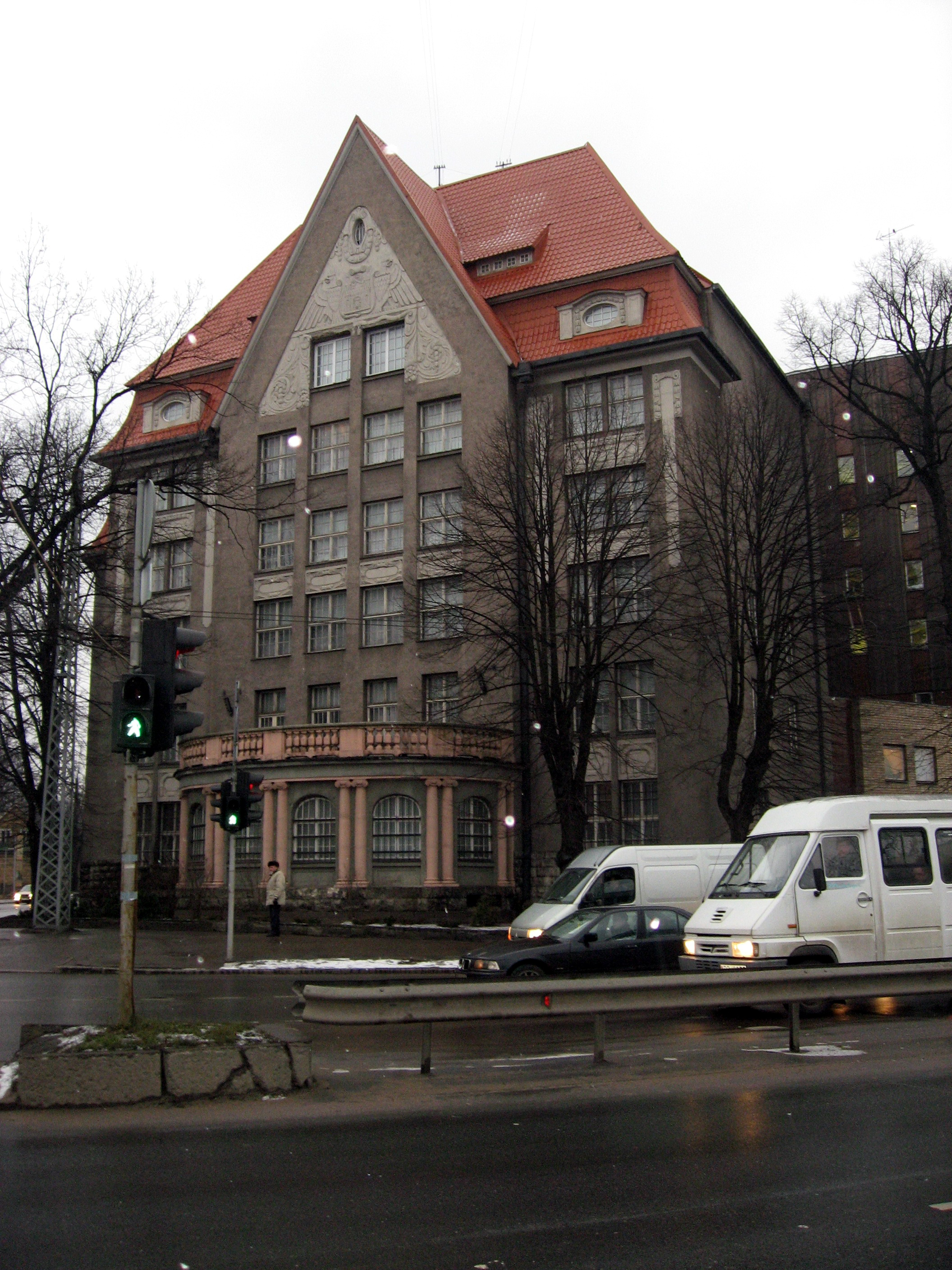 Latvijas Valsts vēstures arhīvs